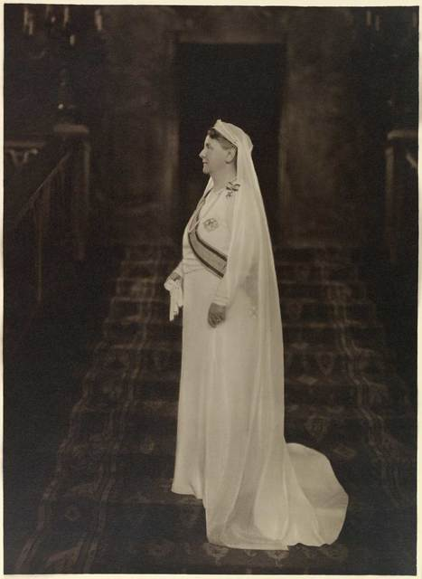 Koningin Wilhelmina, najaar 1934 Na het overlijden van Prins Hendrik droeg Koningin Wilhelmina lange tijd witte rouwkleding. Zo poseerde ze voor Franz Ziegler op de trap in de vestibule van Paleis Het Loo in het najaar van 1934, wat een indrukwekkend portret opleverde. Maar zoals destijds niet ongebruikelijk was, werd ook hier geretoucheerd: Ziegler maakte de Koningin wat slanker dan ze was.